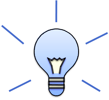 لمبة